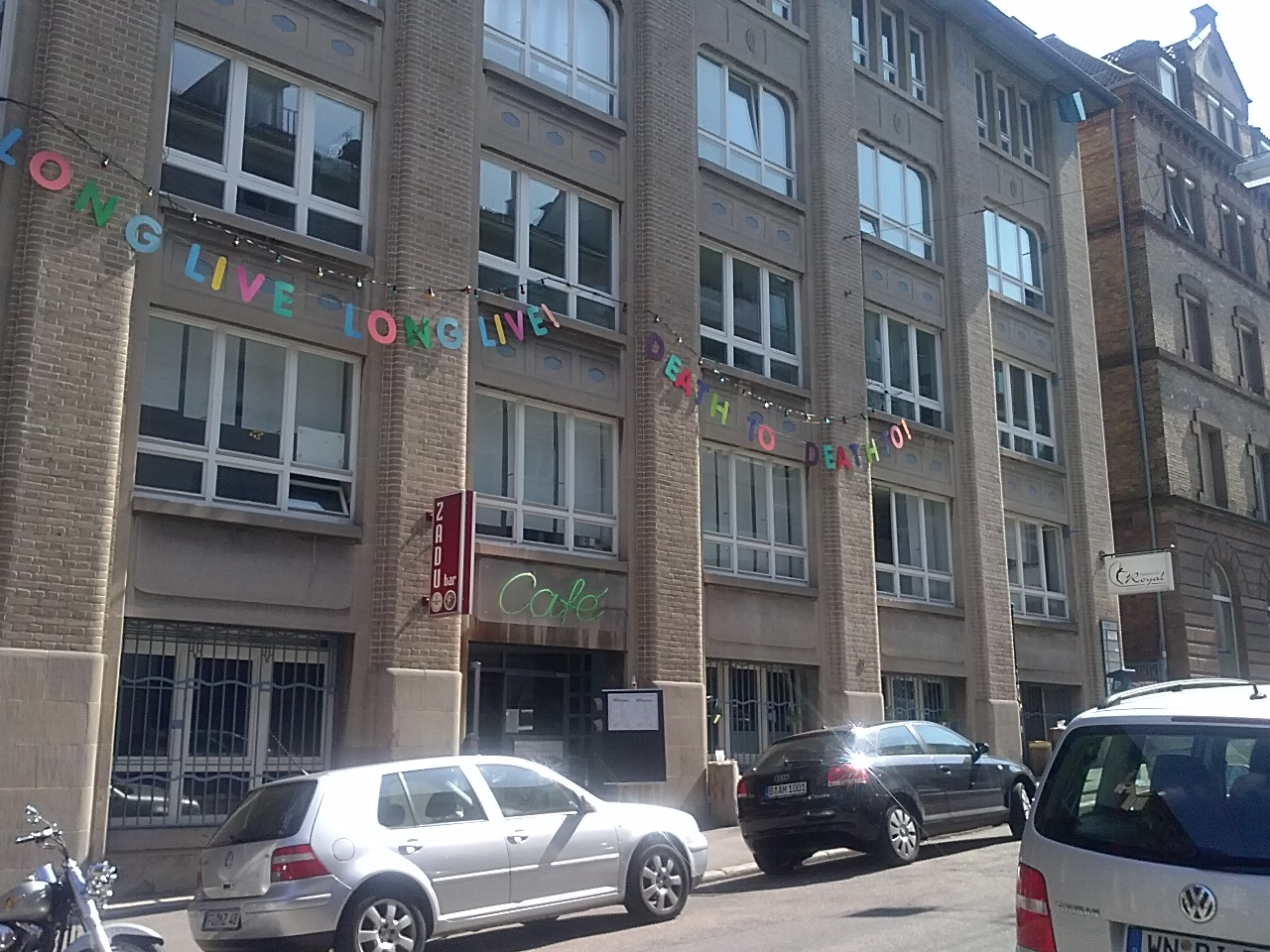 Die Fassade des Künstlerhaus Stuttgart mit Zadu Bar